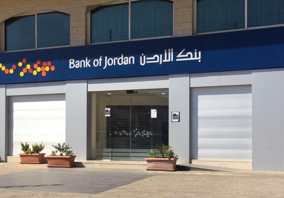 صورة لأحد فروع بنك الأردن في العاصمة عمان